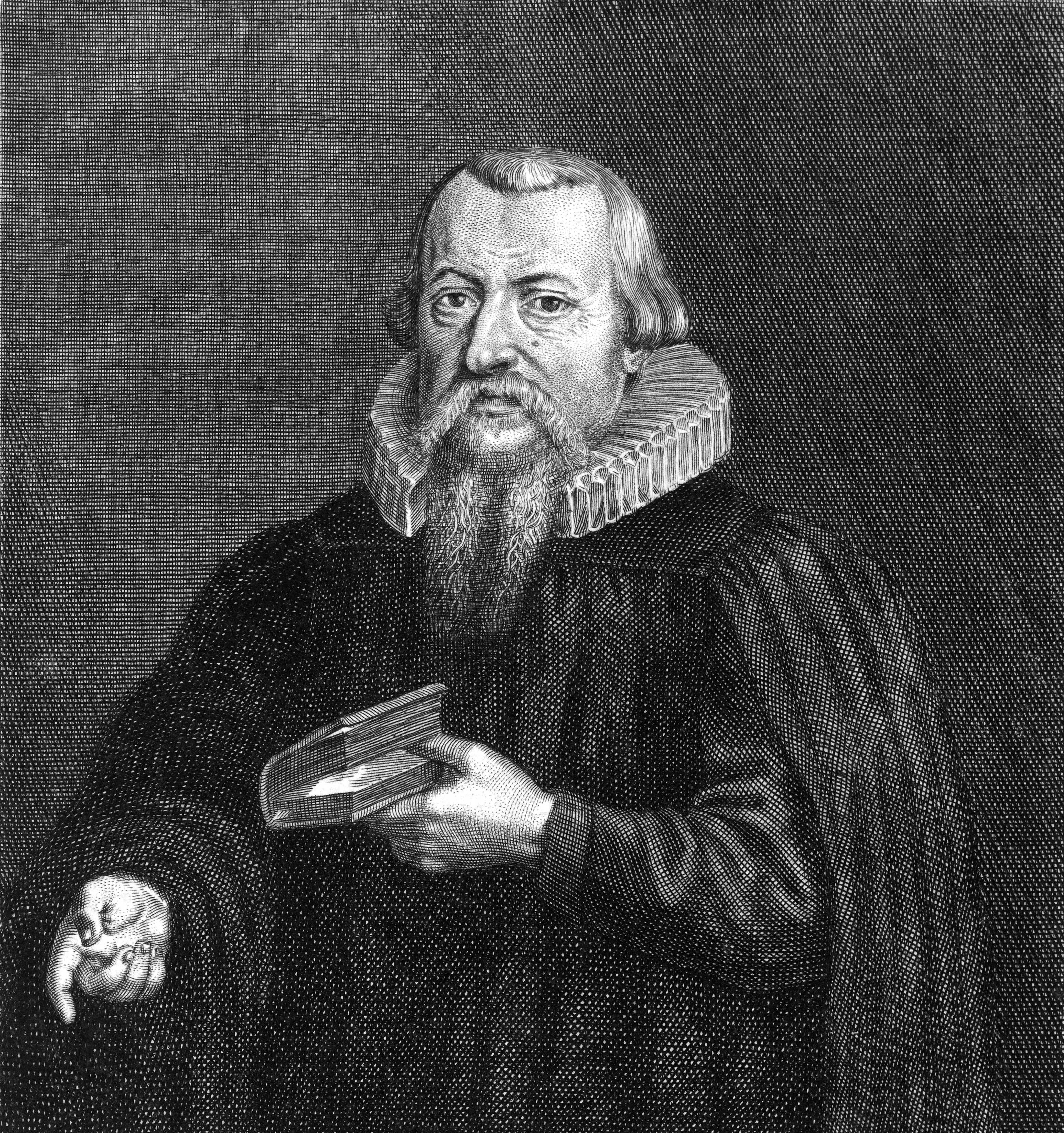 Depicted person: Johannes Saubert der Ältere